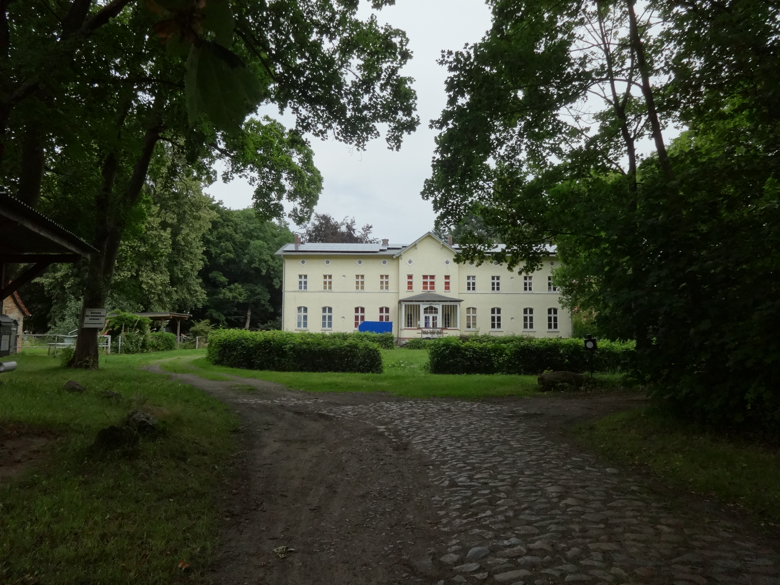 Gutshaus in Krebsow, ein Ortsteil von Groß Kiesow in Mecklenburg-Vorpommern